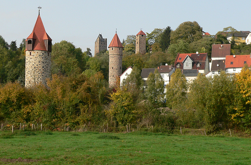 Vier Türme Blick in Fritzlar: Die Kanzel (vorn links), der Winterturm (Mitte), der rechteckige Frauenturm (rechts) und der 38 m hohe Graue Turm (hinten)